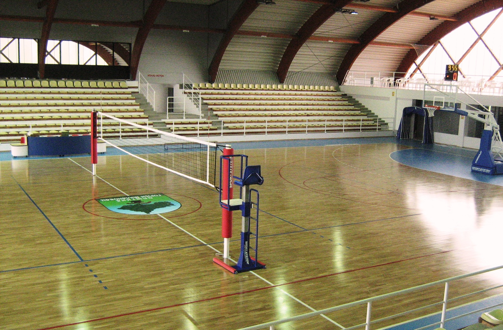 Спортска хала „Бреза“ у Горњем Милановцу